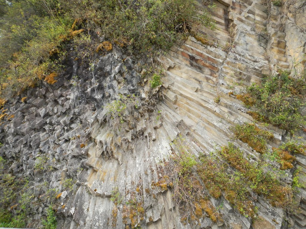 Roca del Abanico. Basalto columnar radial. Camino de Ensenada a Las Cascadas, Región de Los Lagos, Chile.